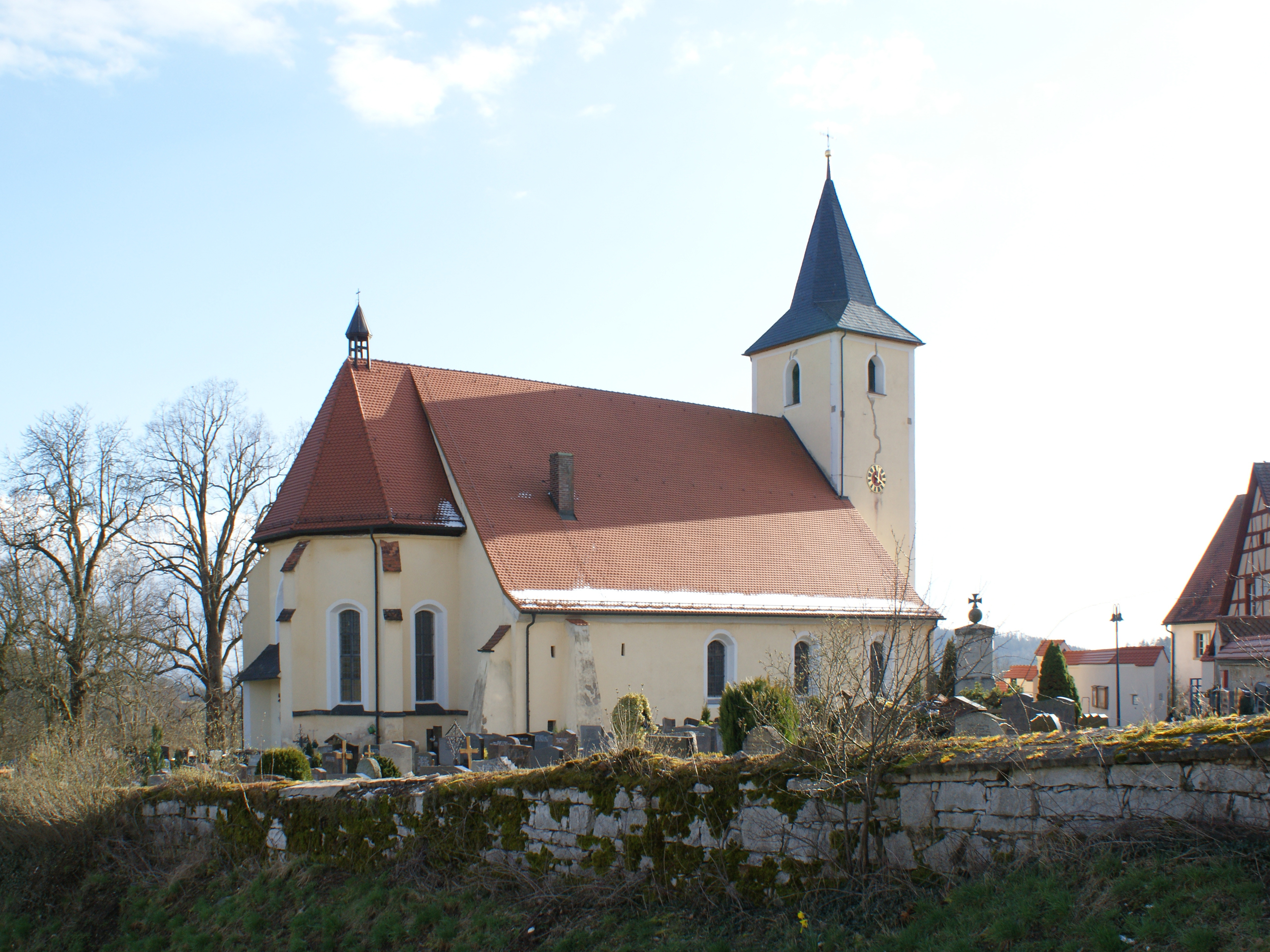 Barockkirche "Maria Heimsuchung" in Bühl Simmelsdorf